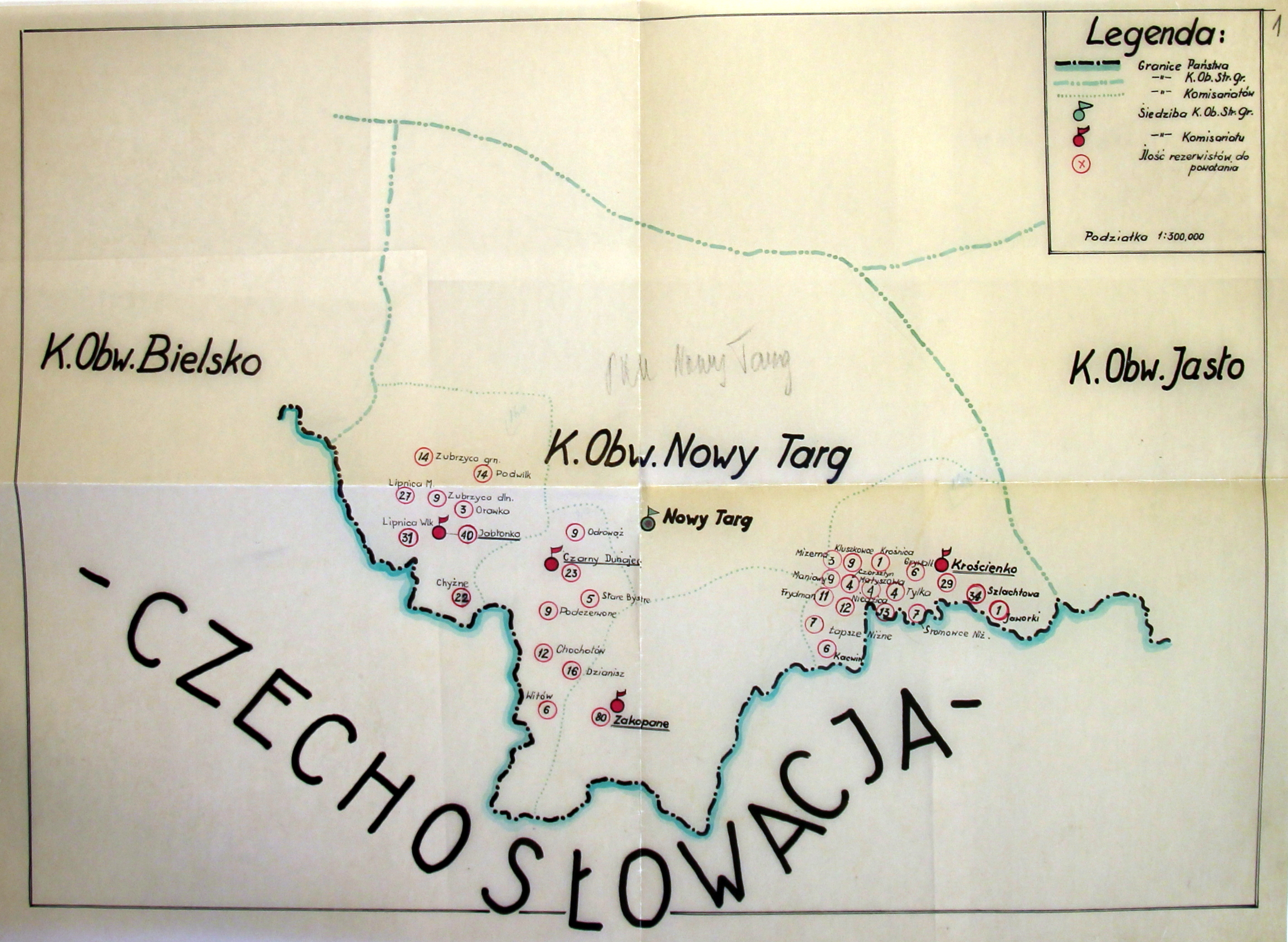 Szkic Obwodu SG Nowy Targ - lata 30. XX wieku